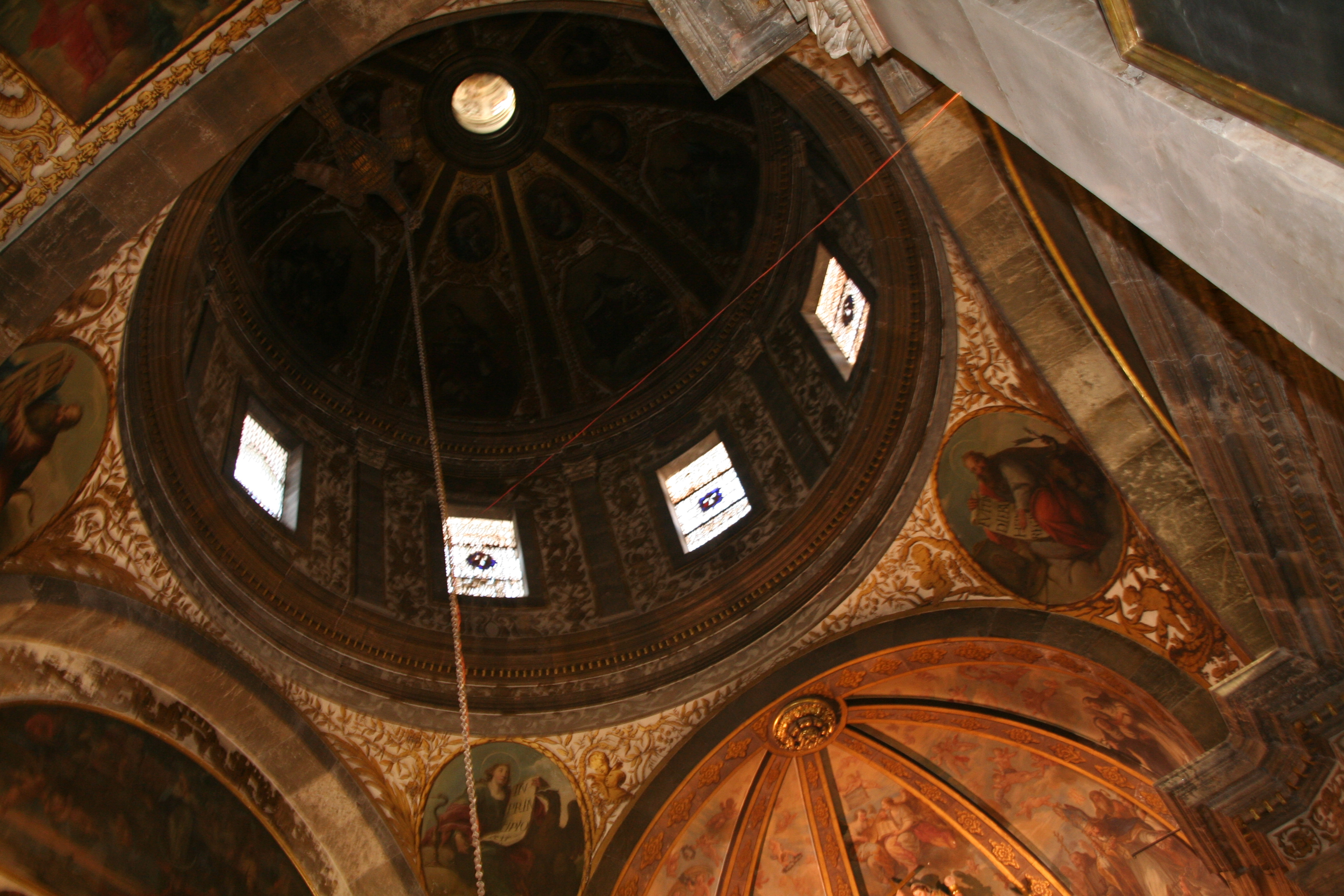 Llanterna de la Capella de la Inmaculada Concepció amb el detall del Porta Lampares fet per Bonaventura Fornaguera i el forjador Joan Andreu.